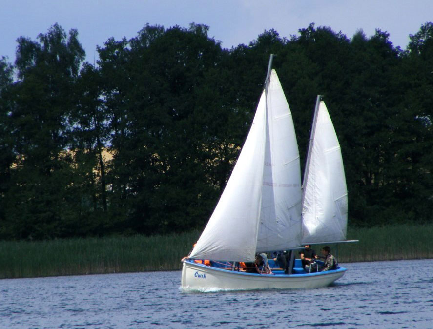 s/y "Ćwik", typ: S-Z, własność Szczepu "Nietykalni", Związek Harcerstwa Rzeczypospolitej, Okręg Dolnośląski, zdjęcie z obozu Szczepu nad j. lubikowskim